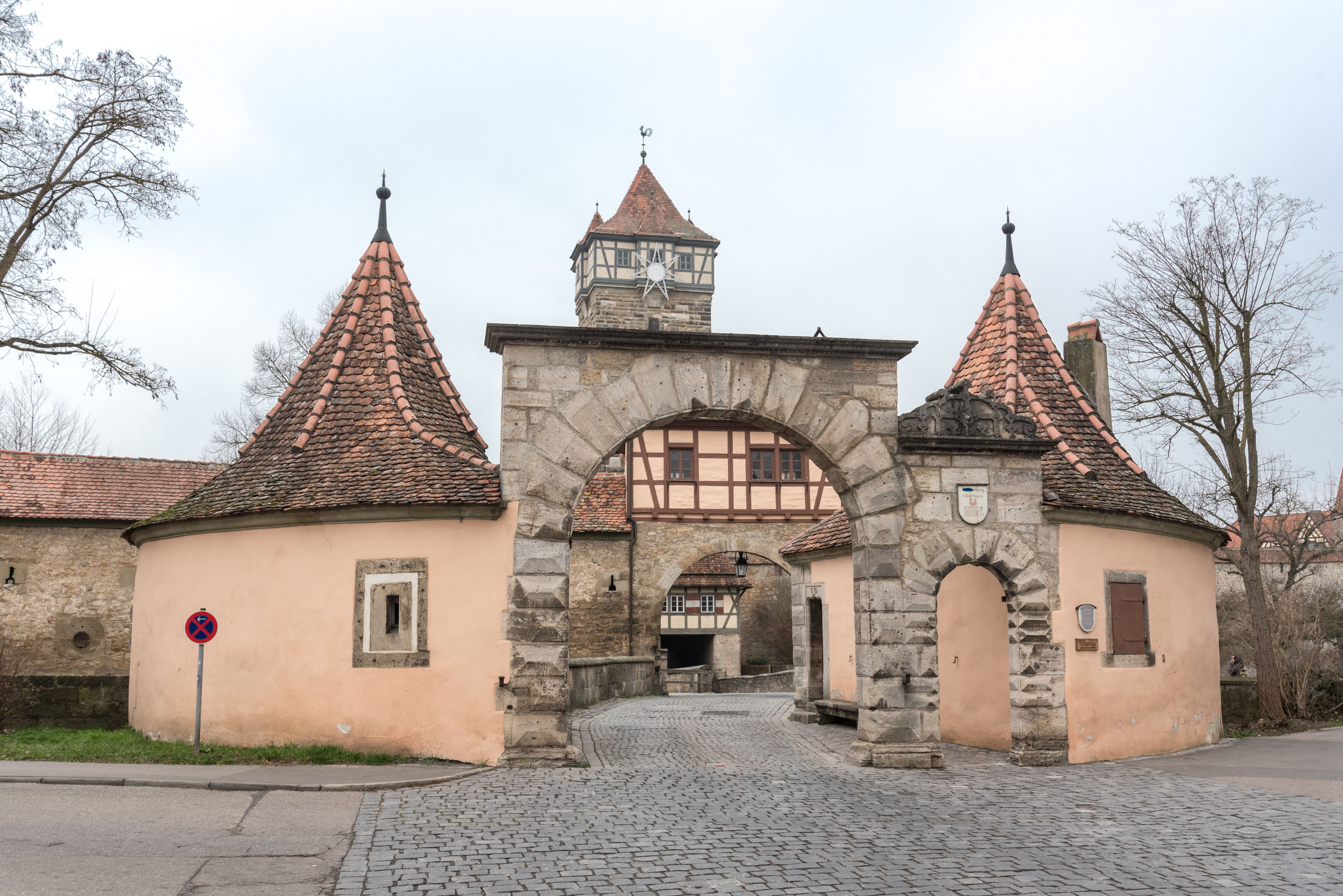 Rothenburg ob der Tauber, Stadtbefestigung, Rödertor, Vortor